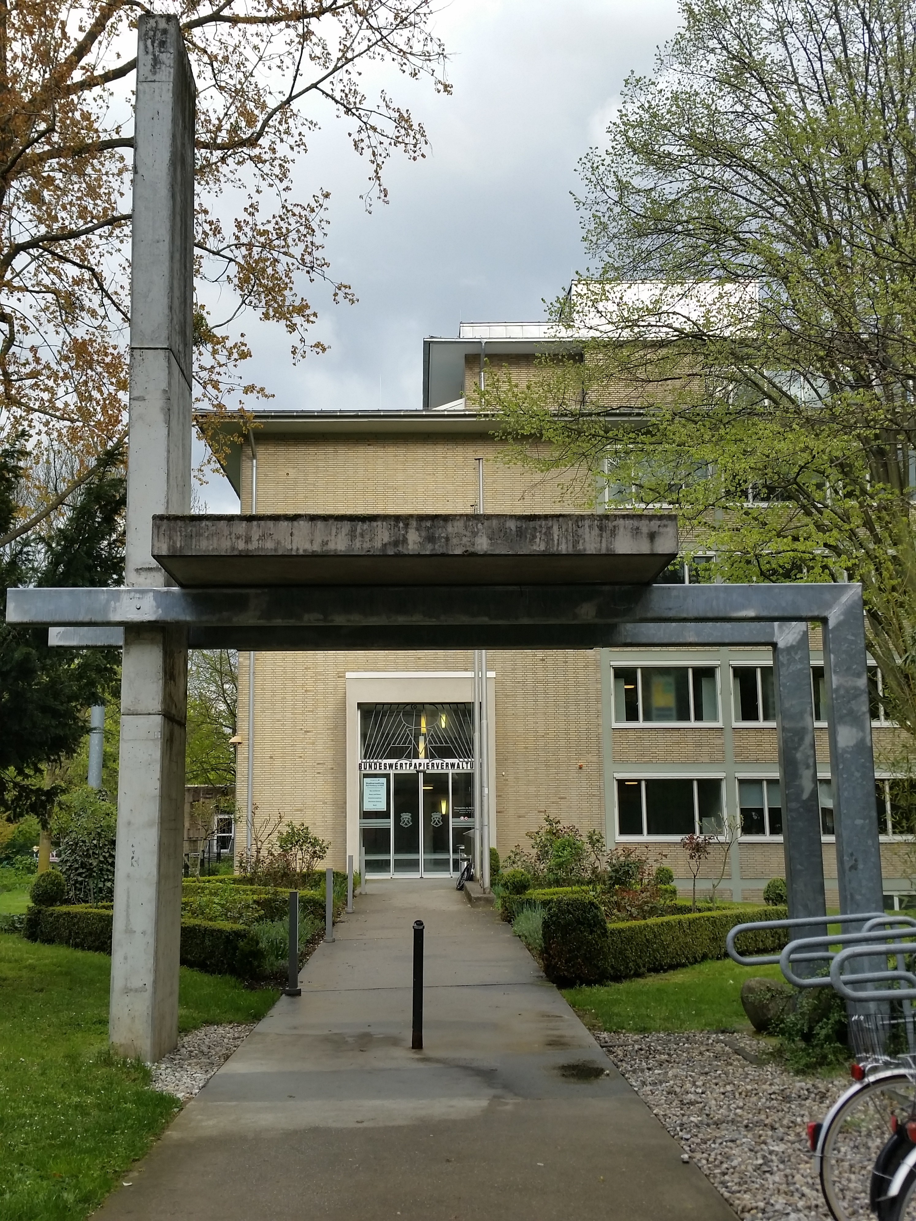 1953 nach Entwurf Walter Freiwald, Marburg, erbautes Gebäude für die Bundesschuldenverwaltung. Heute als Rathaus genutzt.